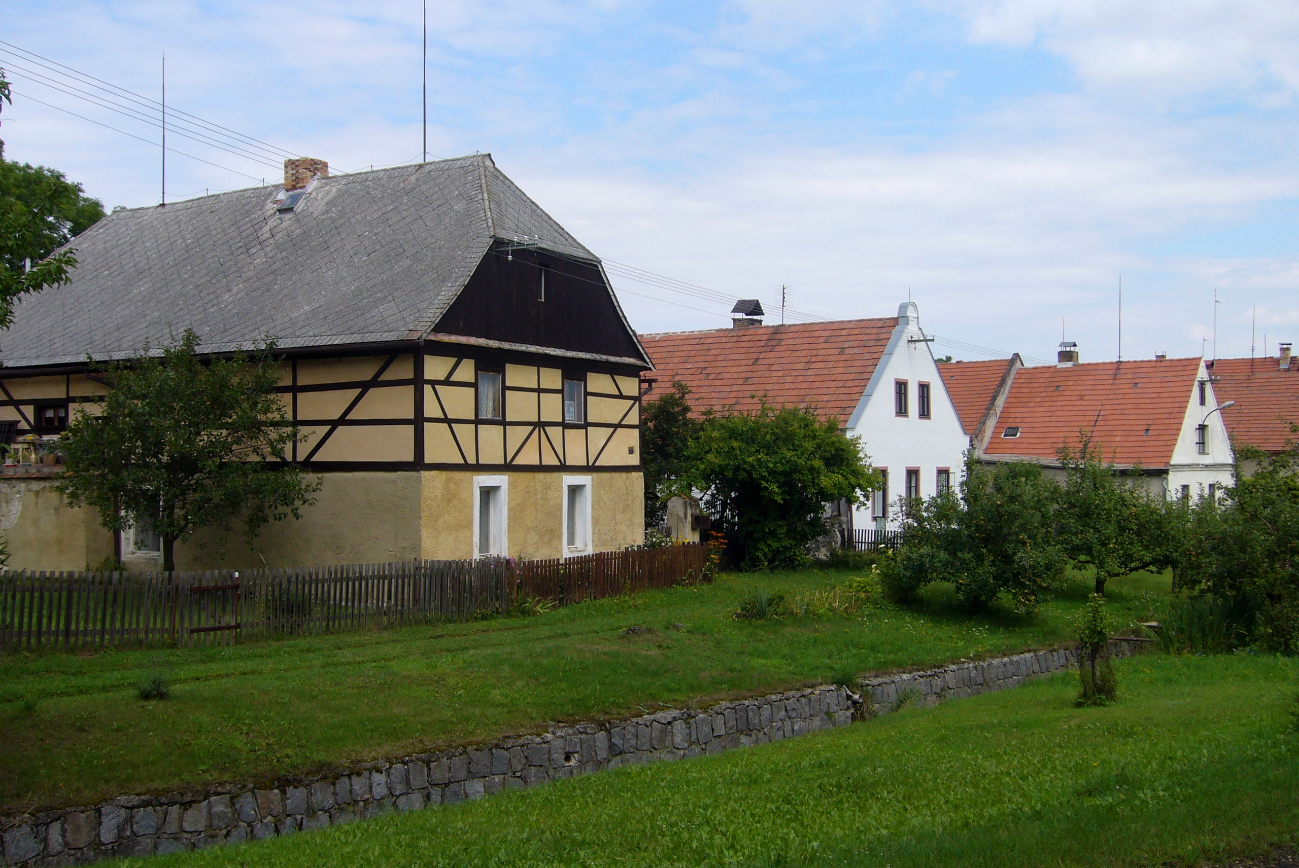 Domy na návsi